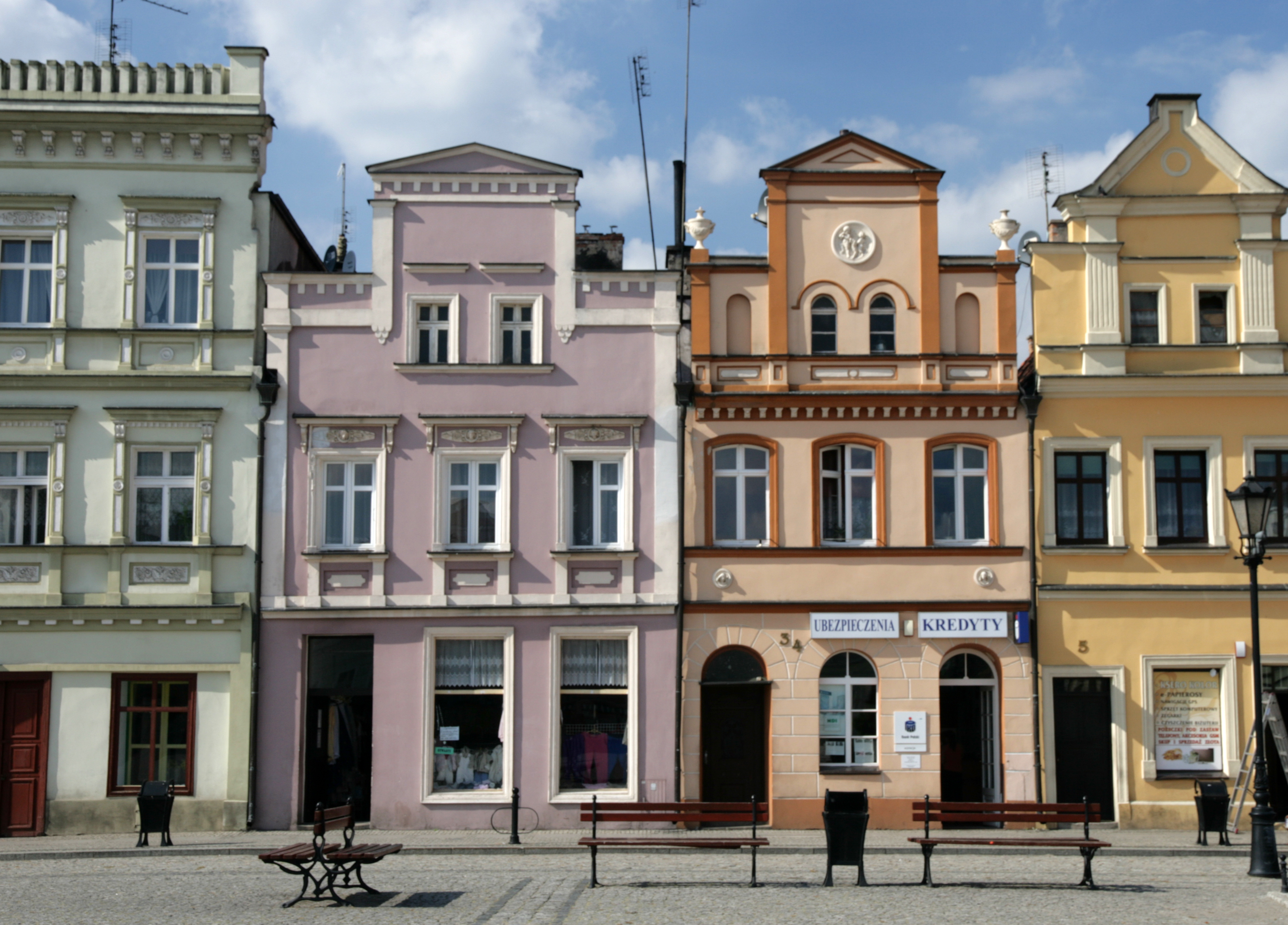 Dom (kamieniczka), mur., XVII, 1840, 1959-1860, Bytom Odrzański, Rynek 3 09.1964.